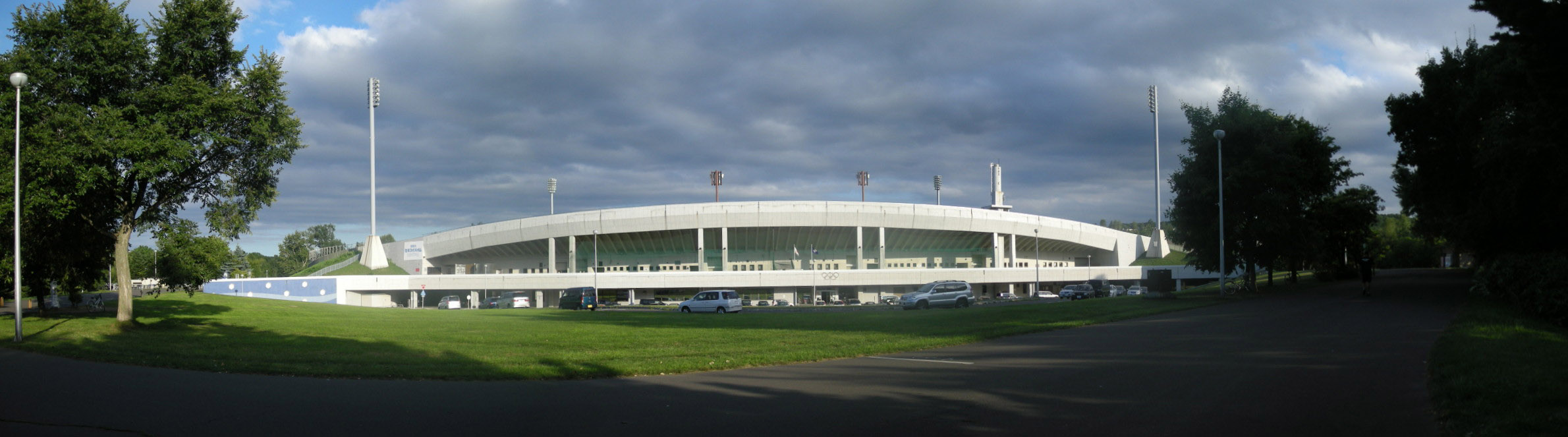 真駒内屋外競技場